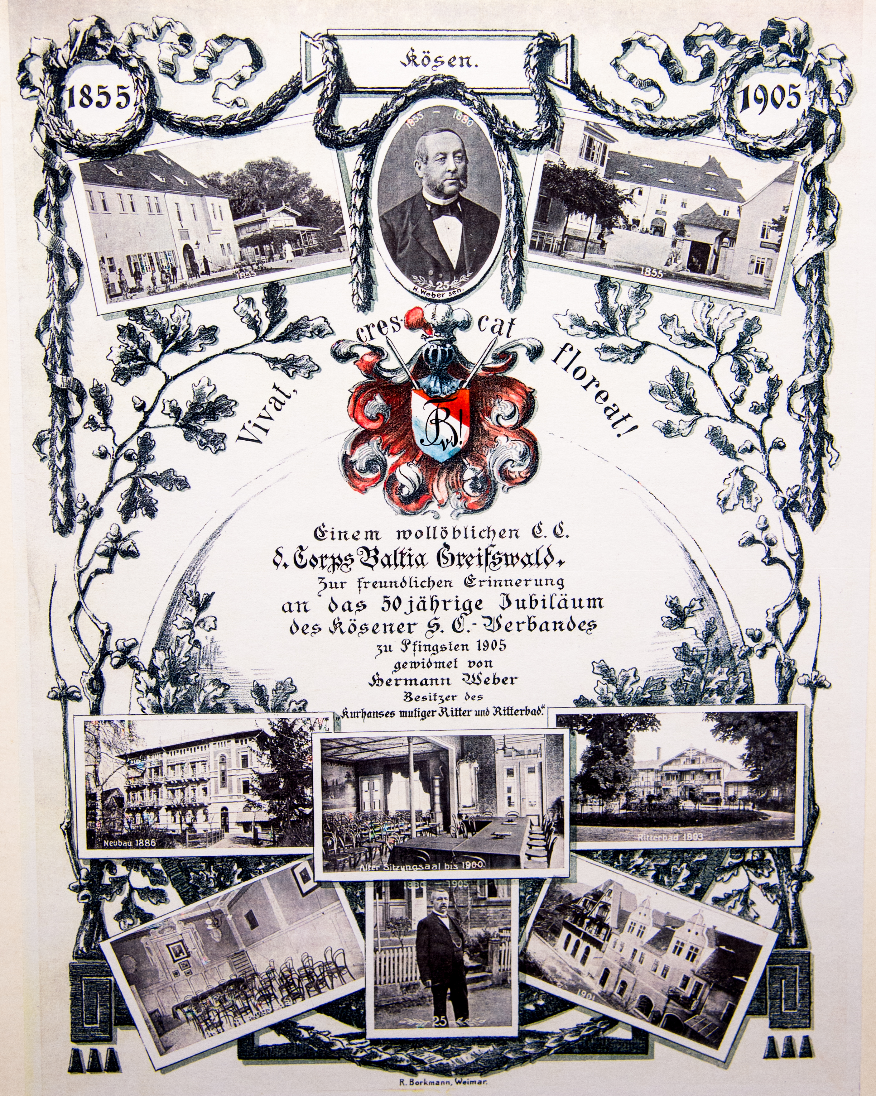 Jubiläumsdruck Mutiger Ritter für das Corps Baltia Greifswald